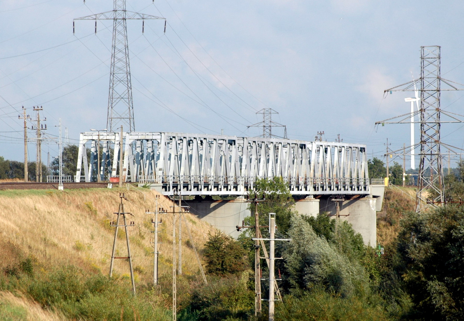 Most kolejowy w cigu linii kolejowej nr 401 nad Dziwną w Wolinie.